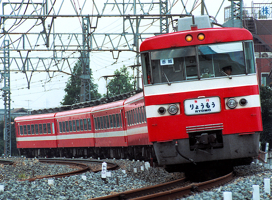 東武鉄道 1800系電車 りょうもう